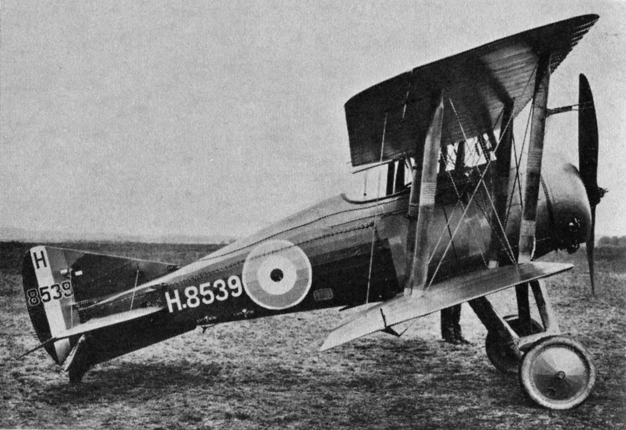 Gloster Nightjar